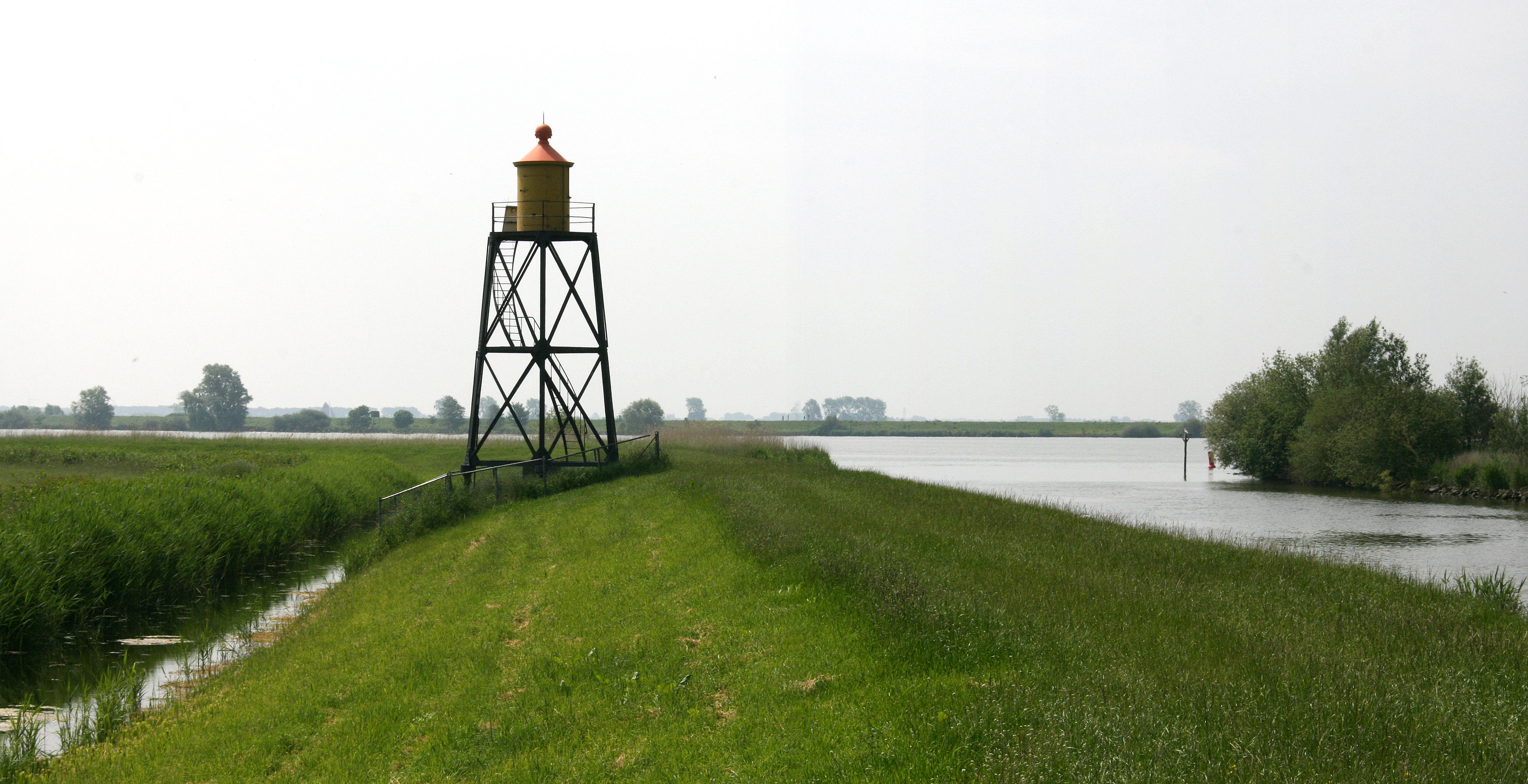 Het lichtbaken behoort bij het complex van twee lichtbakens op de dijk, die parallel loopt aan de Nieuwendijk gelegen nabij de haven van Nieuwendijk behorende tot de gemeente Korendijk. Waarschijnlijk is het baken aan het begin van de twintigste eeuw geplaatst. In 1989 is het baken gerestaureerd. Het ijzeren lichtbaken is nog steeds in gebruik ten behoeve het scheepvaartverkeer.